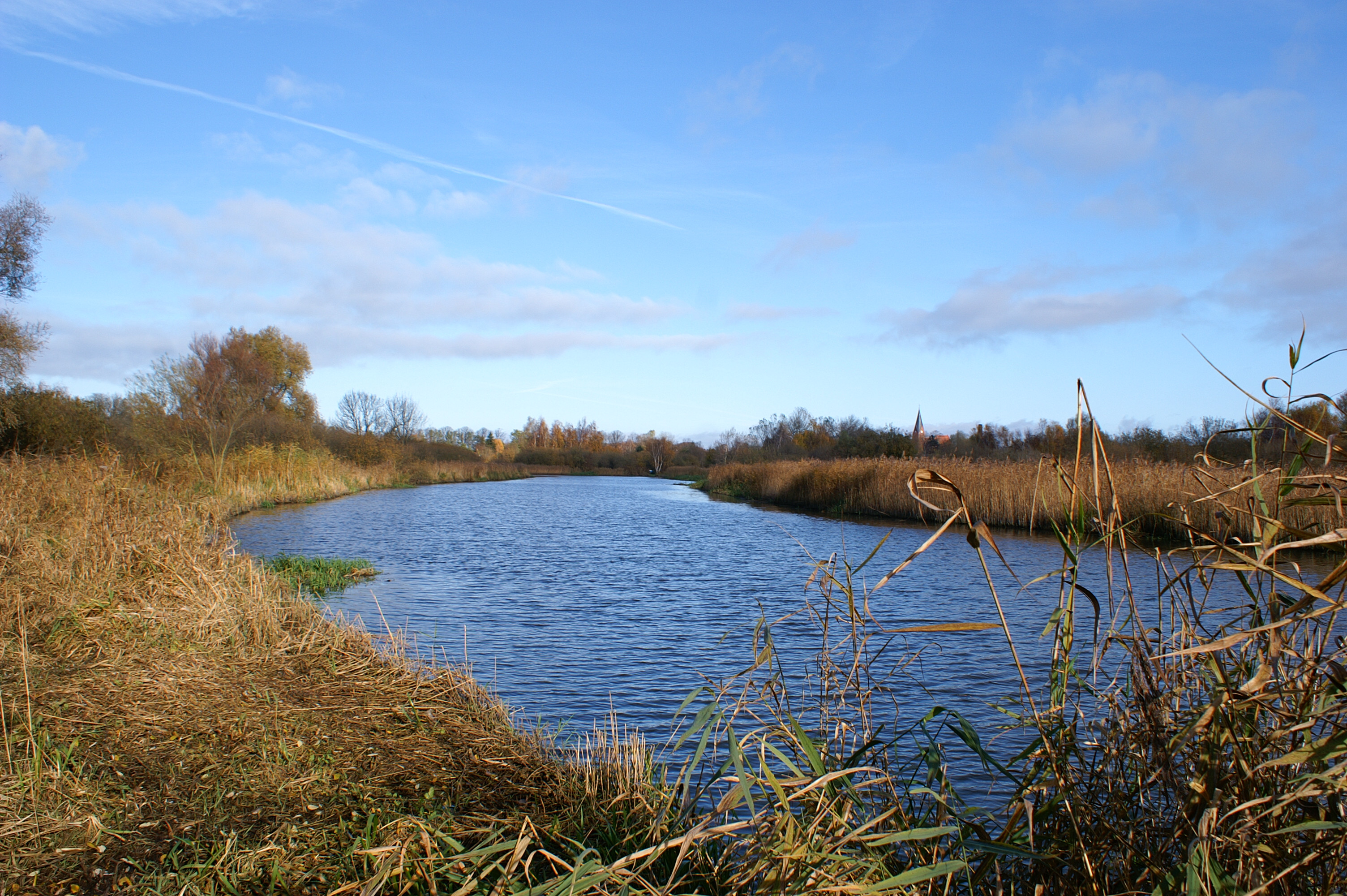 Untere Recknitz bei Damgarten